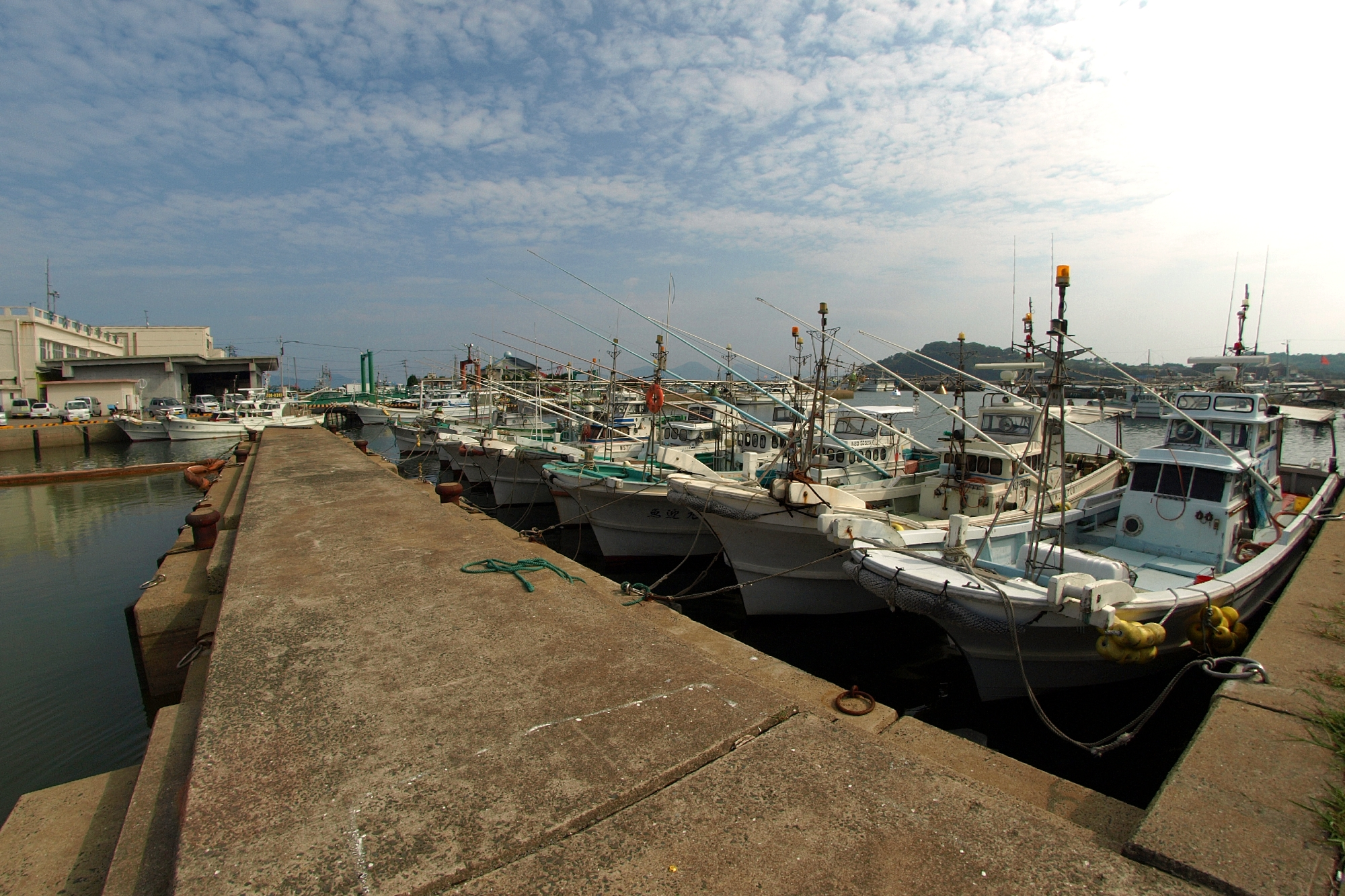 長崎県小値賀町小値賀島の小値賀漁港